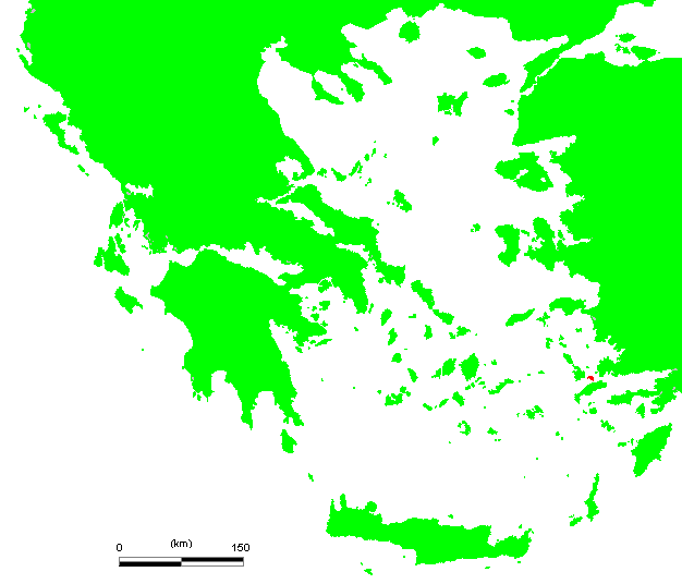 GR Pserimos.PNG (Greek island)